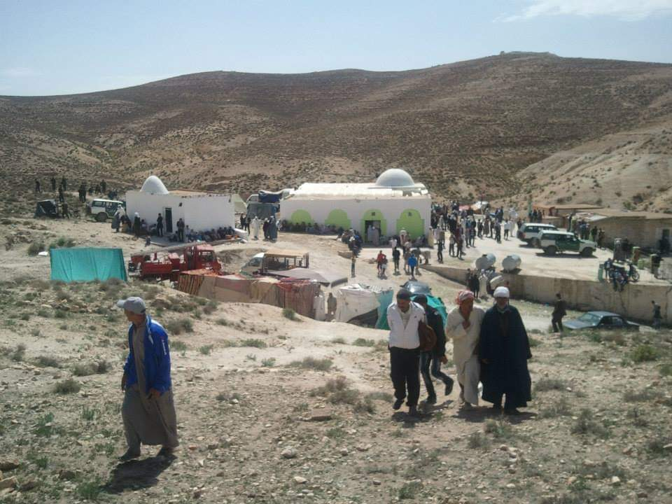 Aaaaa